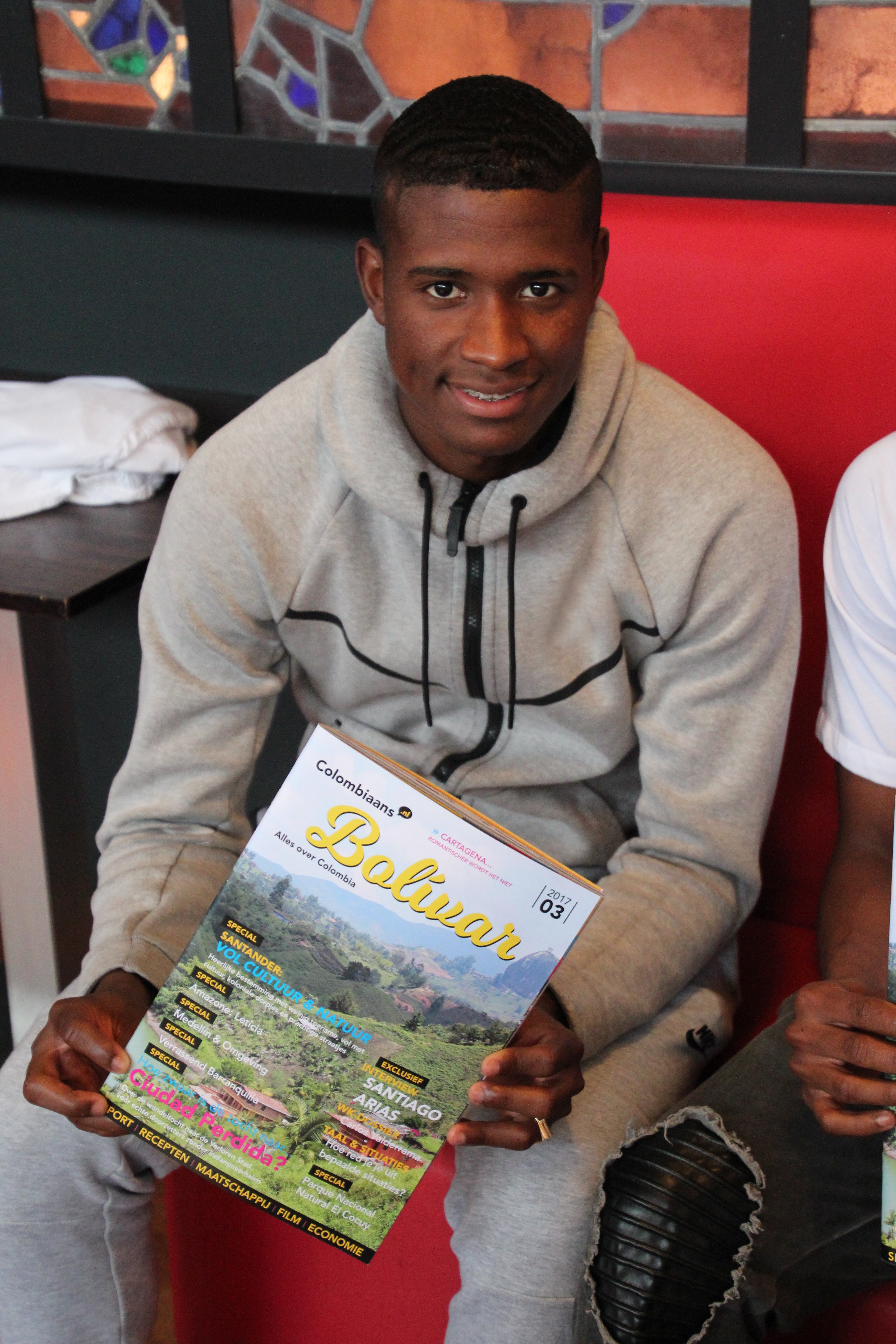 Luis Manuel Orejuela, foto gemaakt tijdens het interview met Luis Orejuela in oktober 2017 namens het Colombia Magazine voor de community Colombiaans.nl (